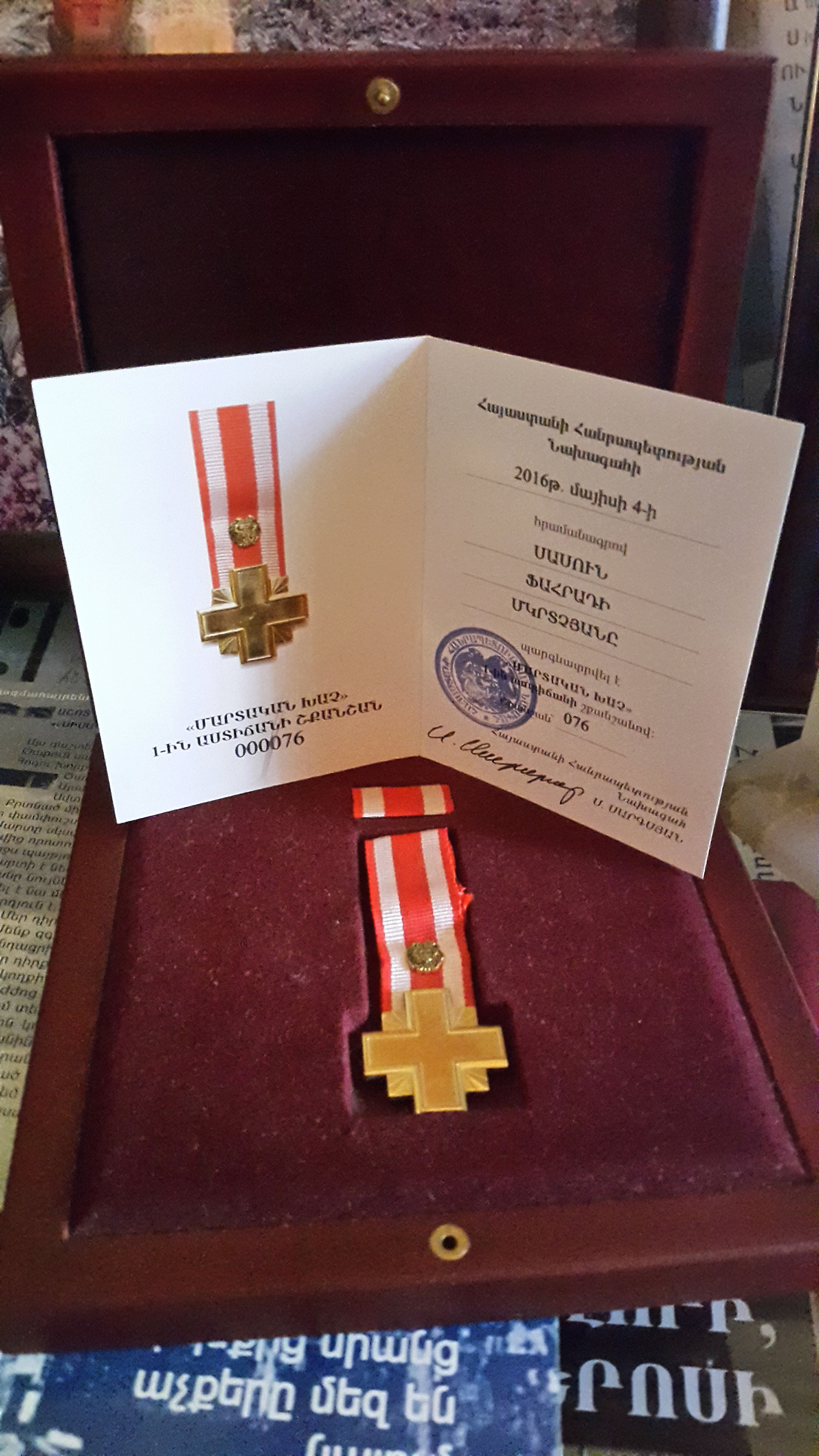 Մարտական խաչ առաջին աստիճանի շքանշան